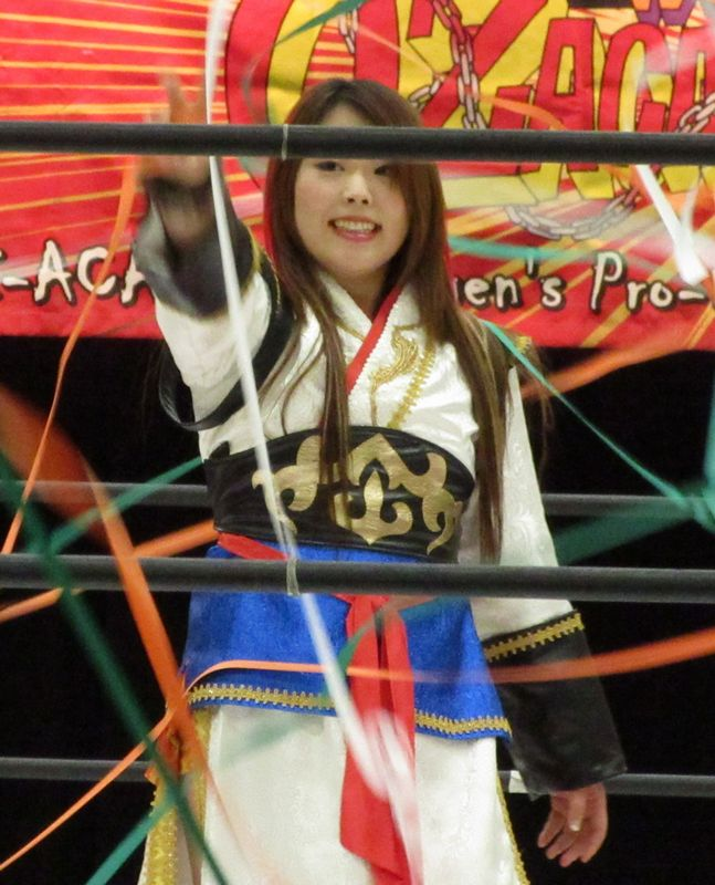 2016.5.1大阪